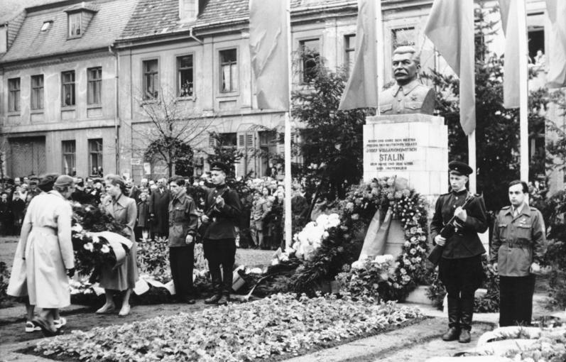 Burg, Stalindenkmal, Enthüllung Zentralbild/Biscan 10.5.1954 Enthüllung eines Stalindenkmals in Burg bei Magdeburg Zu einer eindrucksvollen Kundgebung der deutsch-sowjetischen Freundschaft gestaltete sich am Tag der Befreiung die Enthüllung eines Stalindenkmals in Burg bei Magdeburg. Die Stalinbüste ist ein Werk des Magdeburger Bildhauers Rossdeutscher. UBz: Die Bevölkerung von Burg legte zu Ehren Stalins und der für die Befreiung des Deutschen Volkes vom Hitlerfaschismus gefallenen Sowjetsoldaten Kränze nieder.